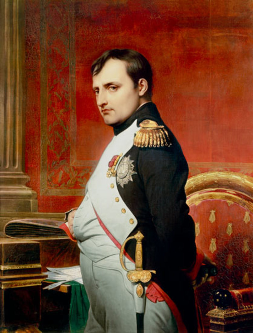 «L’empereur Napoléon Ier dans son cabinet de travail en 1807»